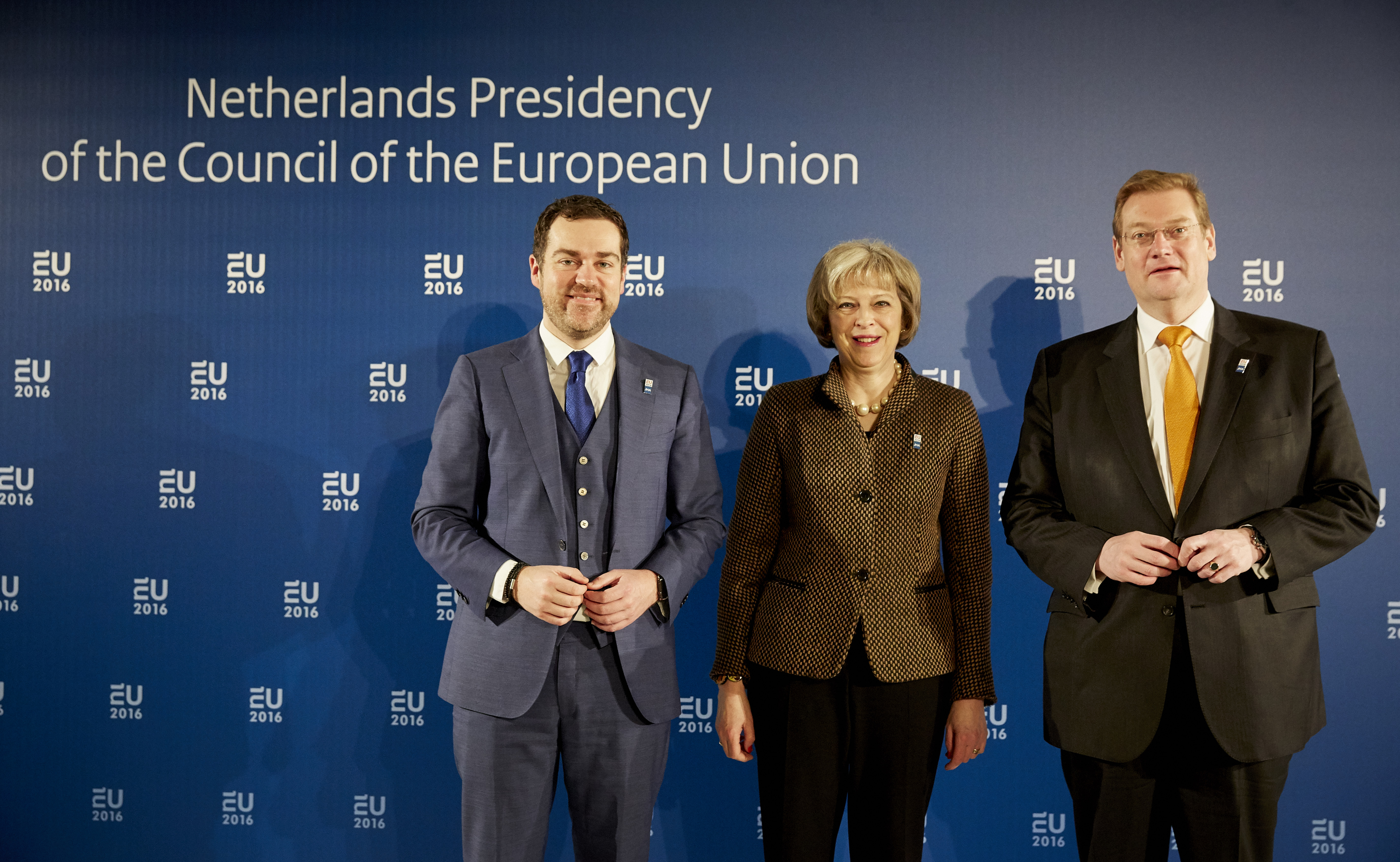 Amsterdam, 25 januari 2016 / Amsterdam, January 25th 2016. Minister Ard van der Steur en staatssecretaris Klaas Dijkhoff De ministers van Veiligheid en Justitie van de Europese Commissie bij het Scheepvaartmuseum in Amsterdam. The ministers of Justices of the European Commission at the Scheepvaartmuseum in Amsterdam by boat. Foto: Rijksoverheid/Martijn Beekman – Photograph: Dutch Government/Martijn Beekman